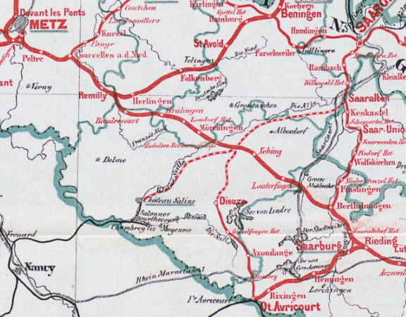 Détail de la Karte der Unter Verwaltung der Kaiserlichen General Direktion zu Strassburg stehenden Eisenbahnen in Elsass-Lothringen und Luxemburg 1878 montrant le tracé de la ligne de Metz à Réding en 1878.